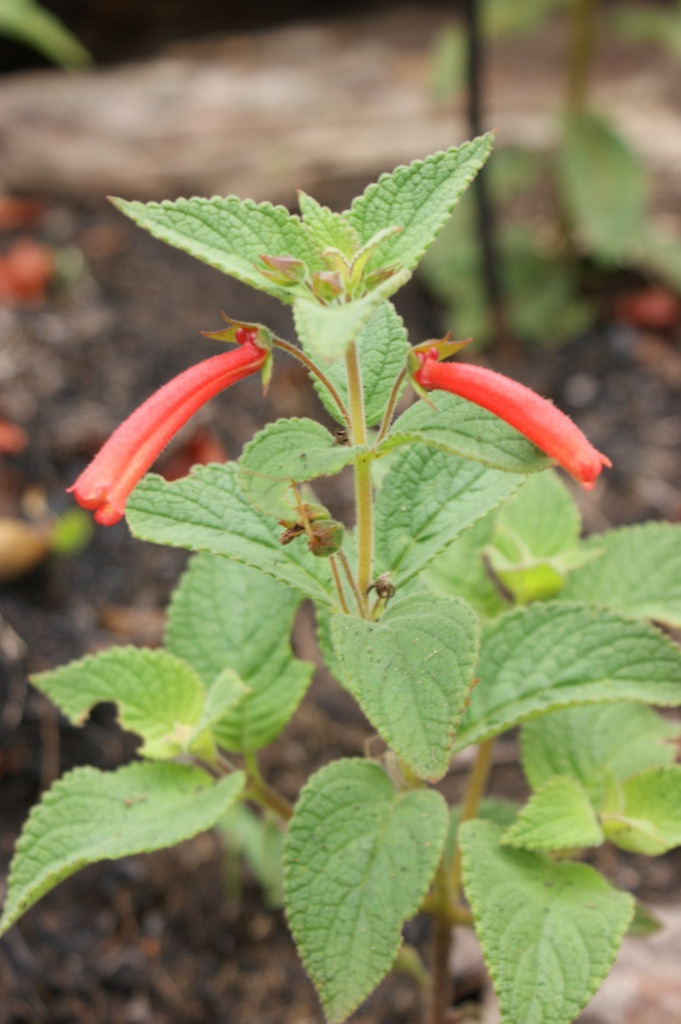 Sinningia incarnata (Aubl.) D.L.Denham - GESNERIACEAE - Parque Estadual da Serra dos Pirineus - Pirenópolis - Goiás - Brasil.